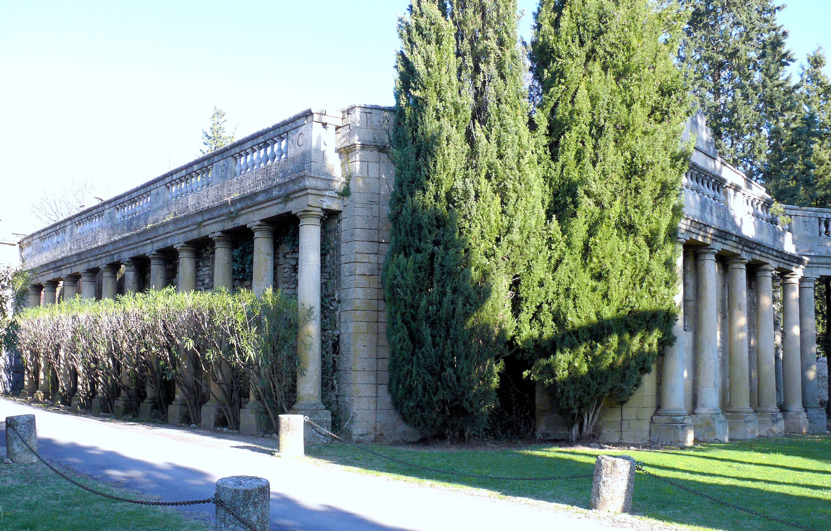 Argilliers - Château de Castille - Colonnades de l'entrée